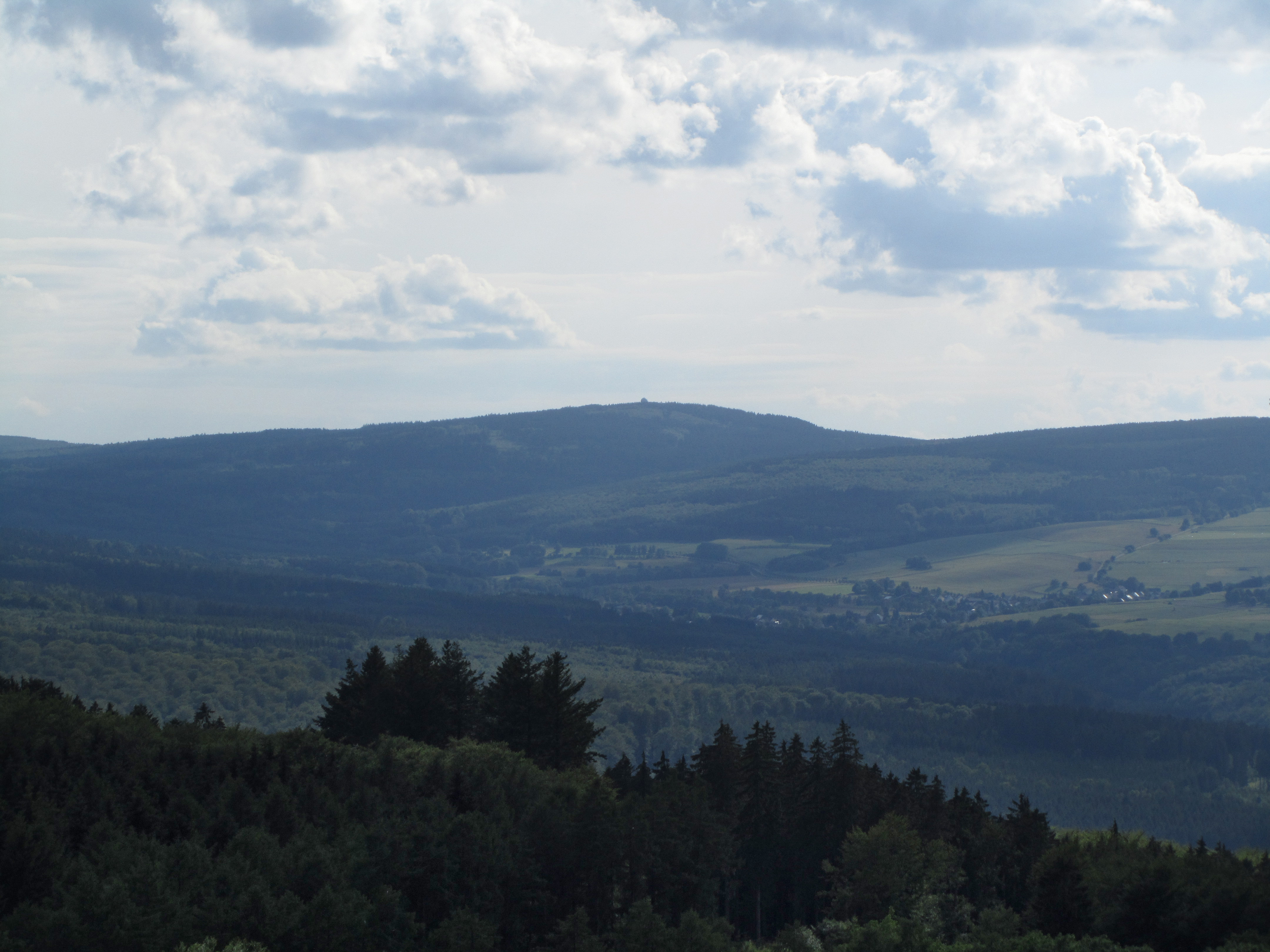 Blick von Burg Wildenburg zum Erbeskopf